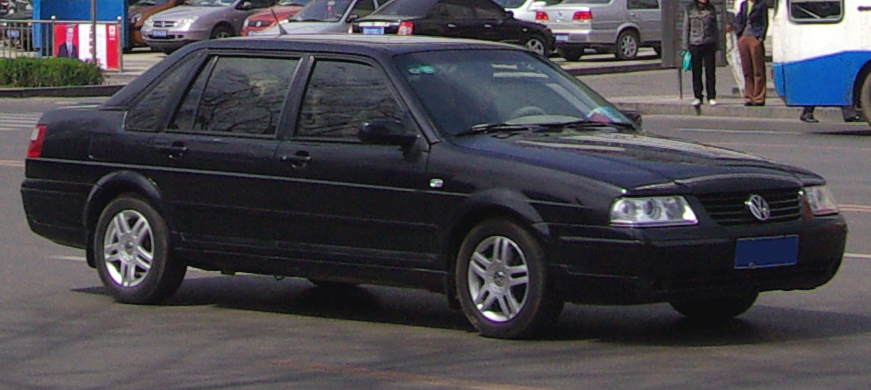 Shanghai-VW Santana 3000 in Handan, China